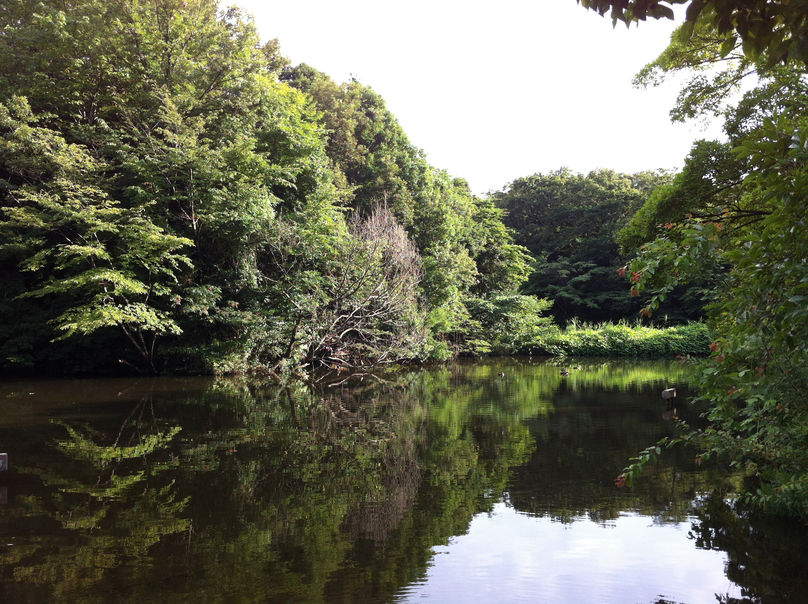 1 Chome-18 Edaminami, Tsuzuki-ku, Yokohama-shi, Kanagawa-ken 224-0007, Japan